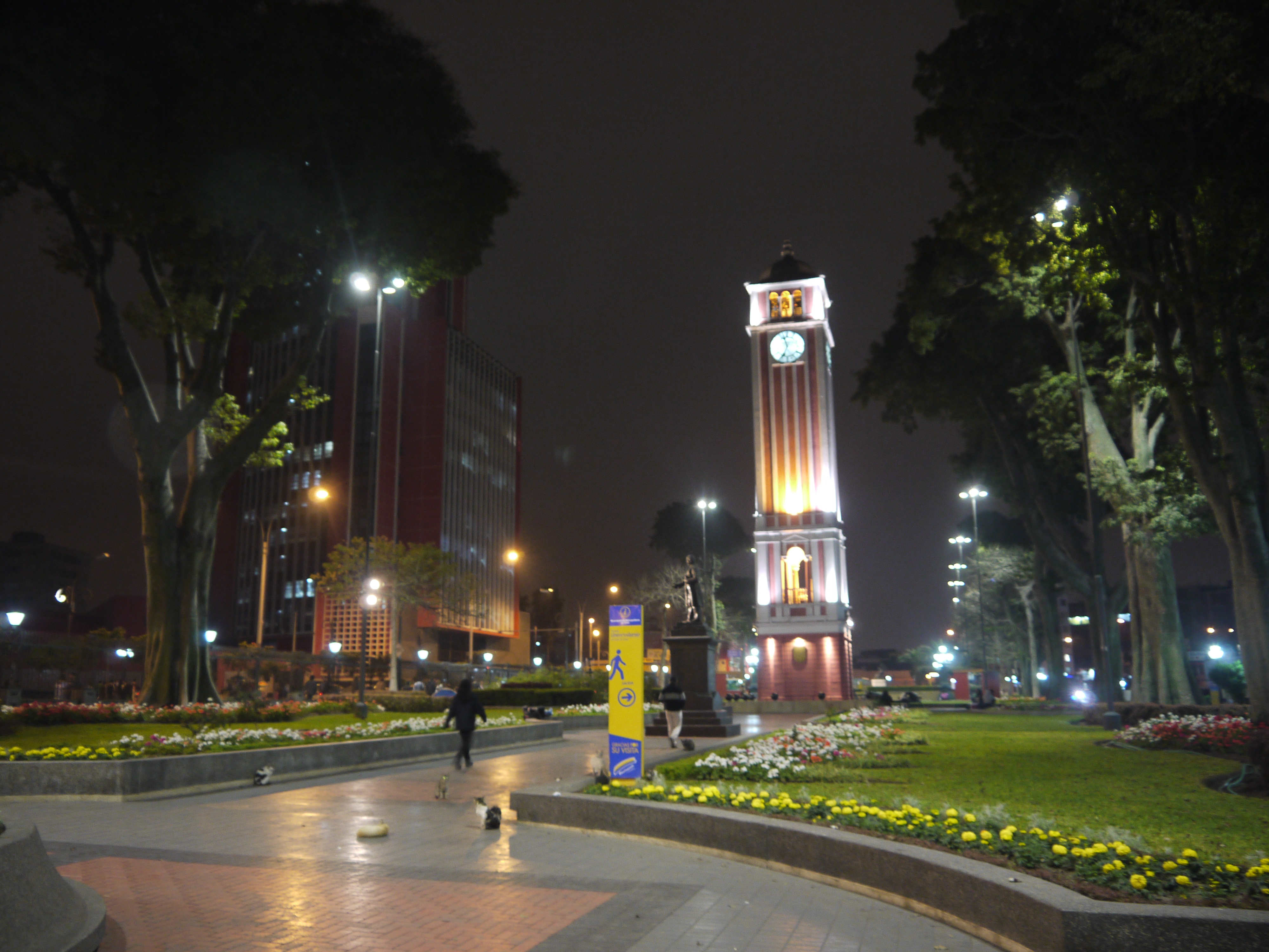 Parque universitario de Lima en la noche